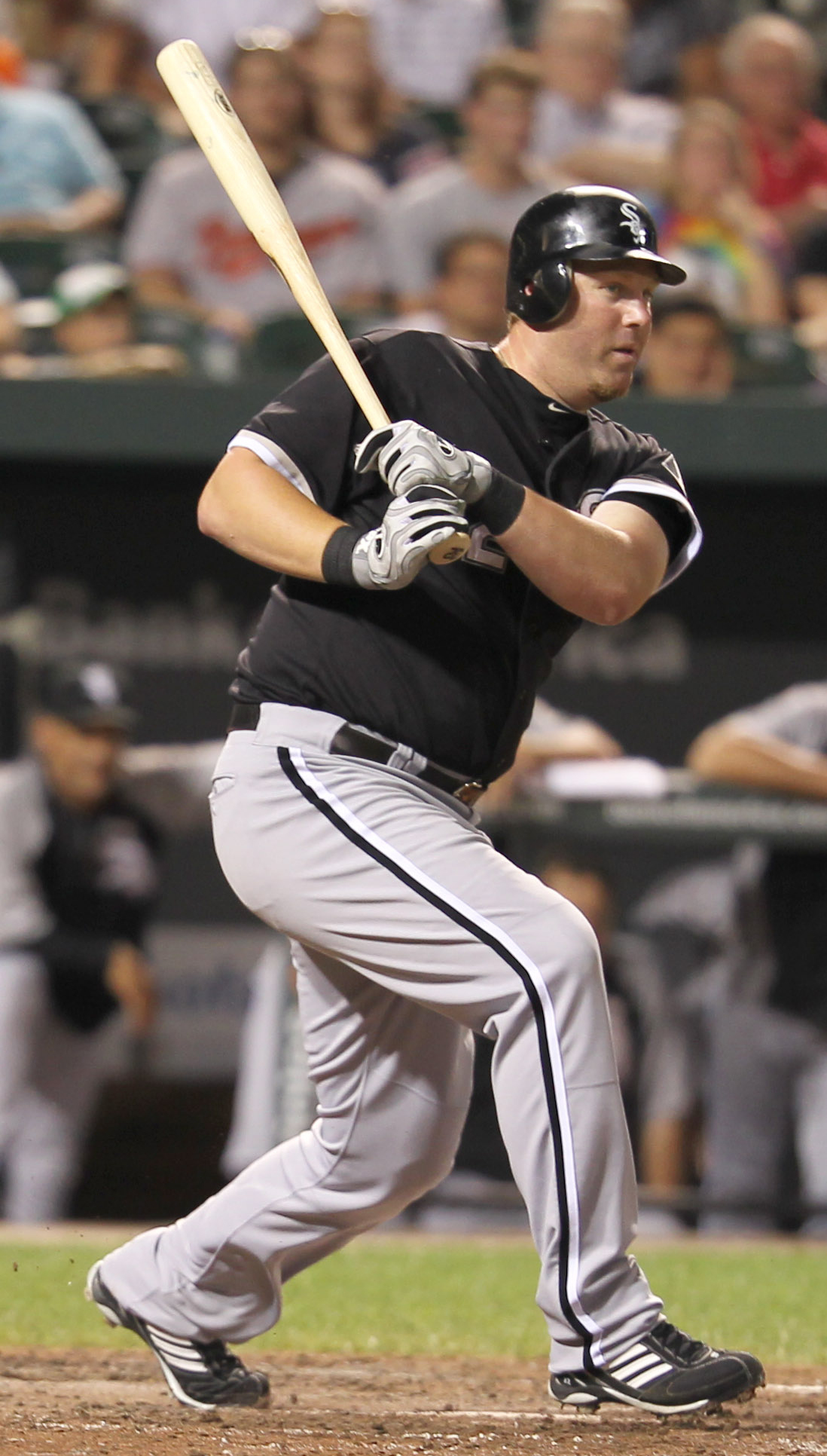 Adam Dunn